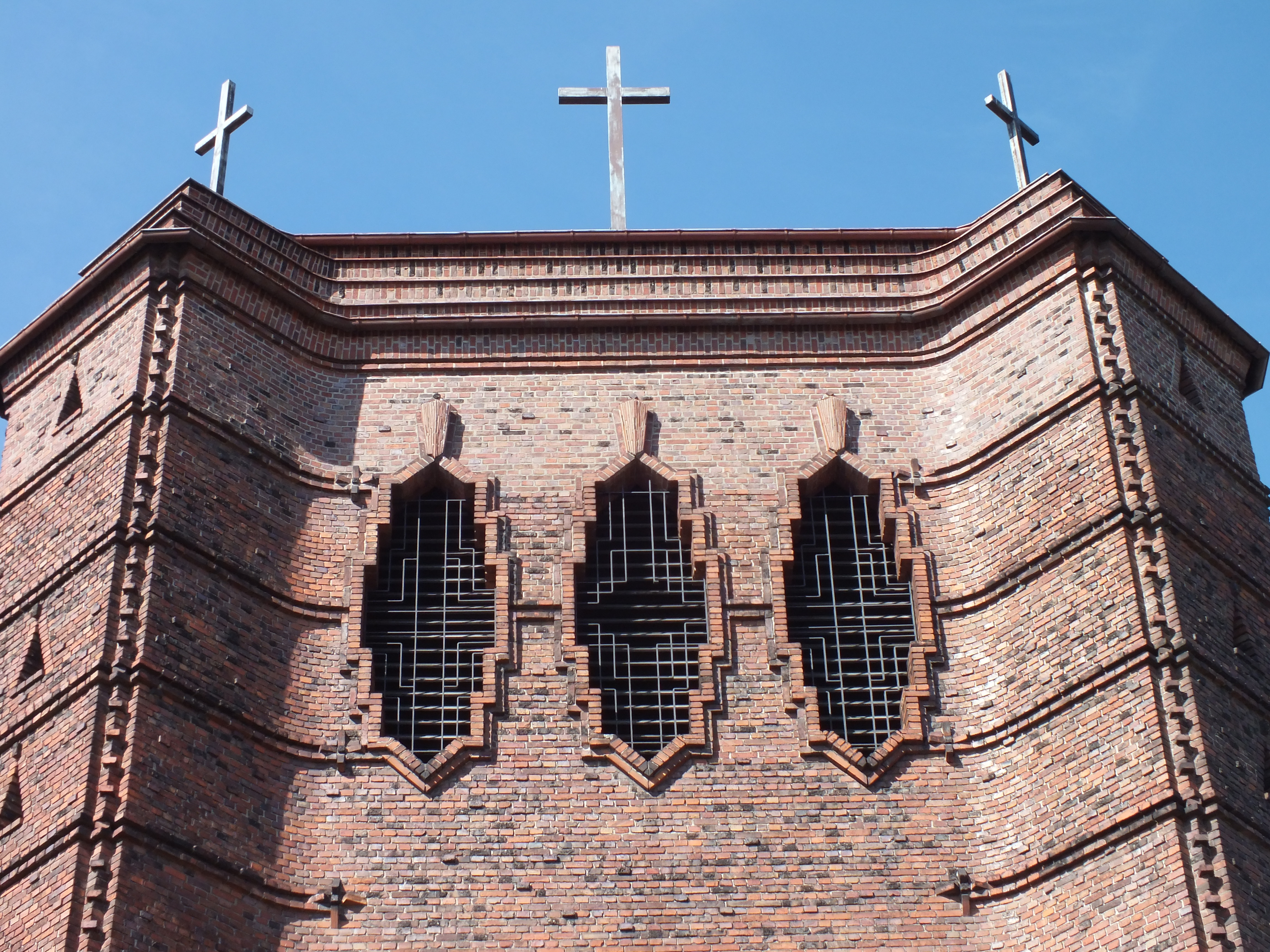 Kirche Maria Magdalena, Berlin-Niederschönhausen: Turmdetail